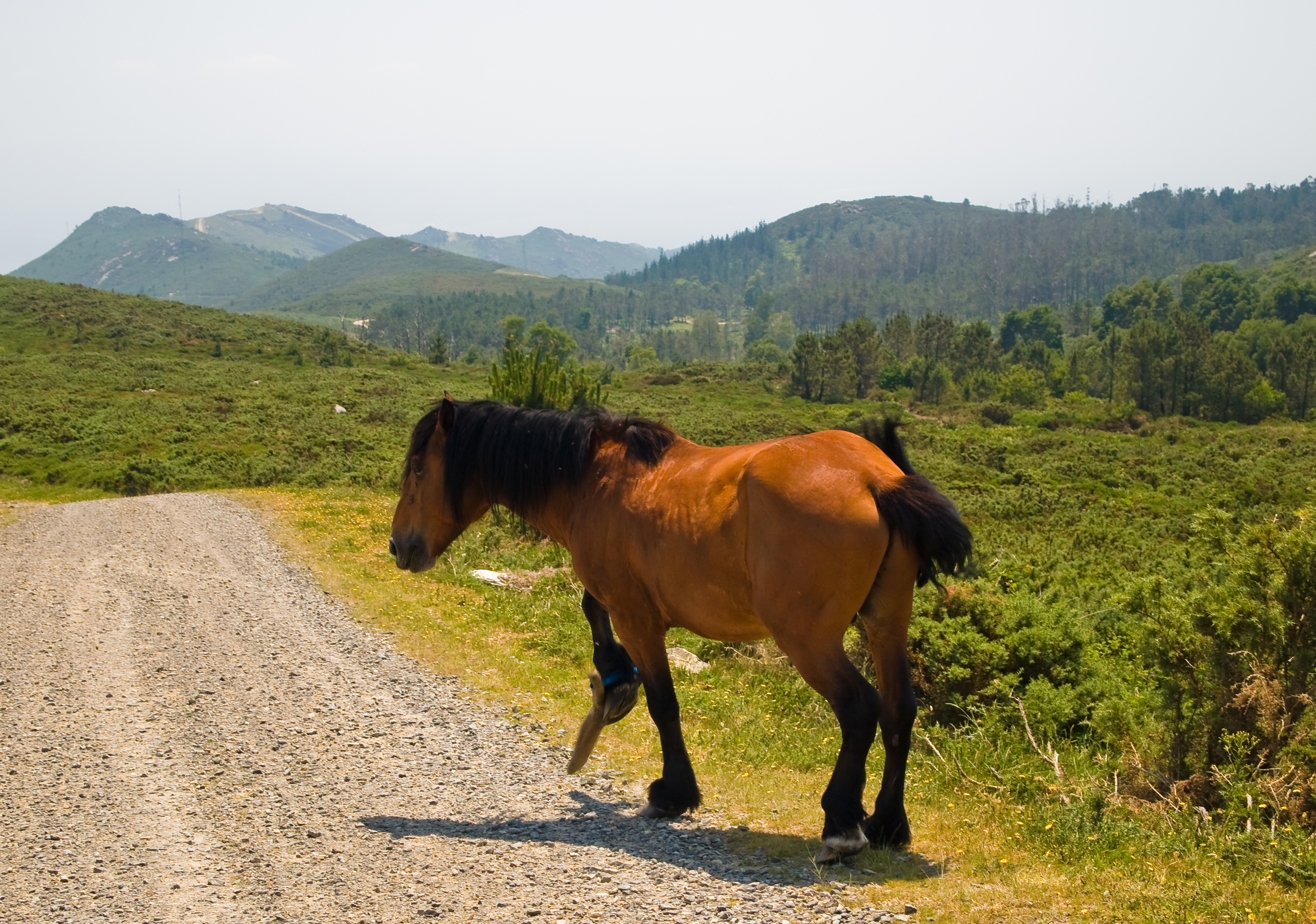 Maltrato animal na Barbanza (obsérvense as trancas nas patas dos cabalos). No Parque Eólico Pedregal no monte Tremuzo, Outes, Galiza